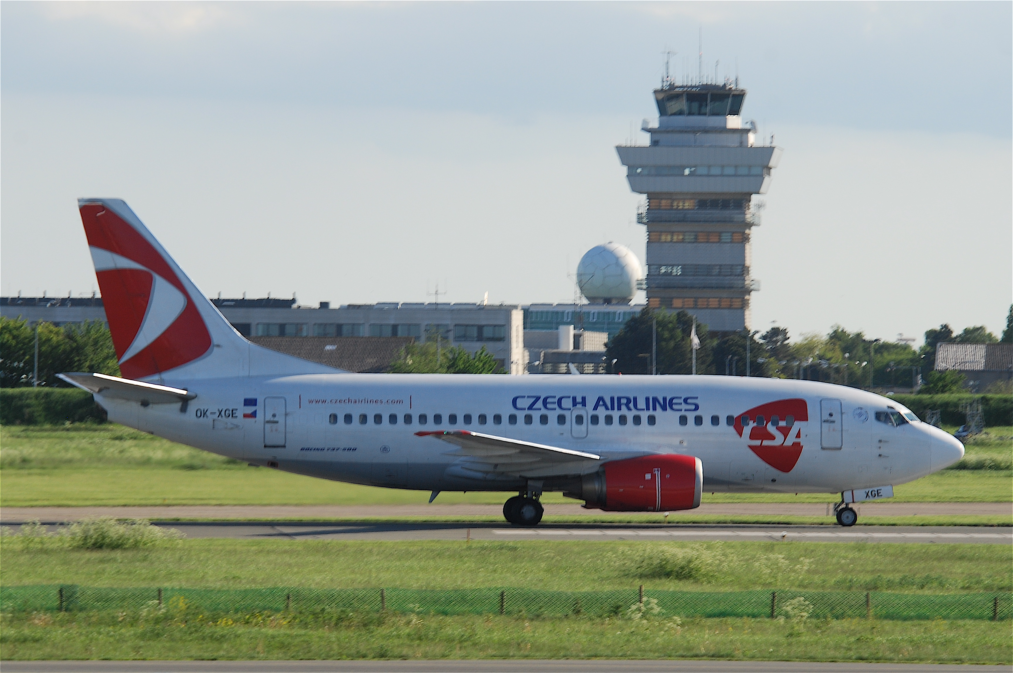 CSA Czech Airlines Boeing 737-500; OK-XGE@CPH;04.06.2010/575bd